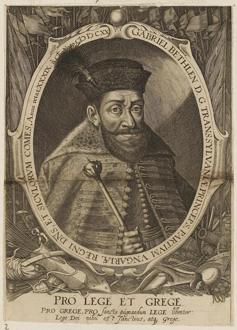 Grafik aus dem Klebeband Nr. 1 der Fürstlich Waldeckschen Hofbibliothek Arolsen Motiv: Gabriel Bethlen, Fürst von Siebenbürgen und 1619–1626 Anführer eines anti-habsburgischen Aufstandes im Königlichen Ungarn